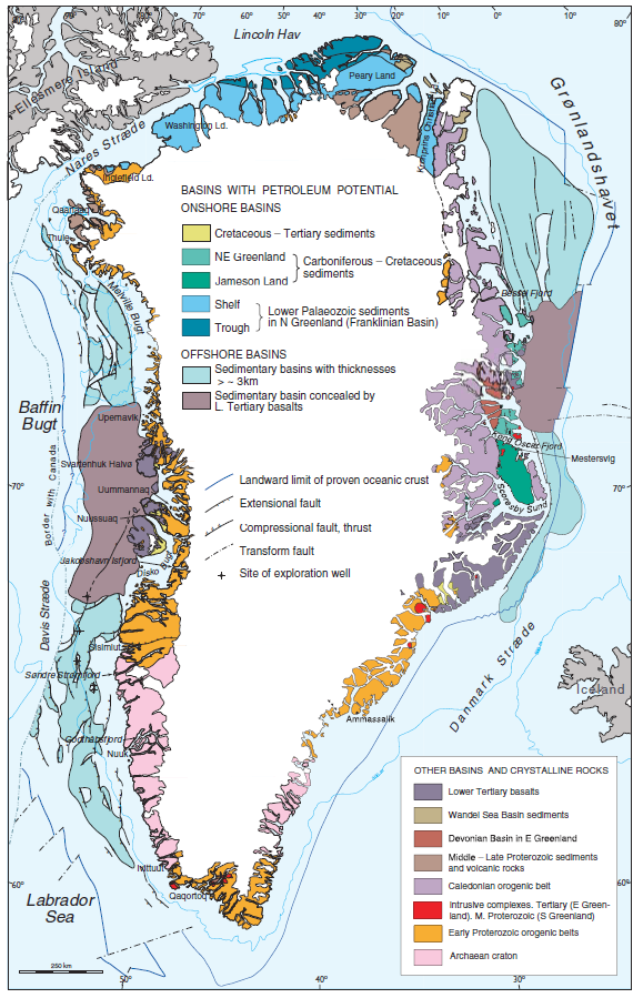 Geologisk kort over Grønland